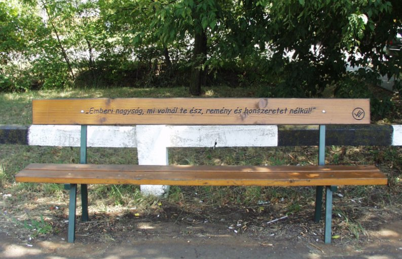 Kazinczy Ferenc-emlékpad, alsógödi vasútállomás